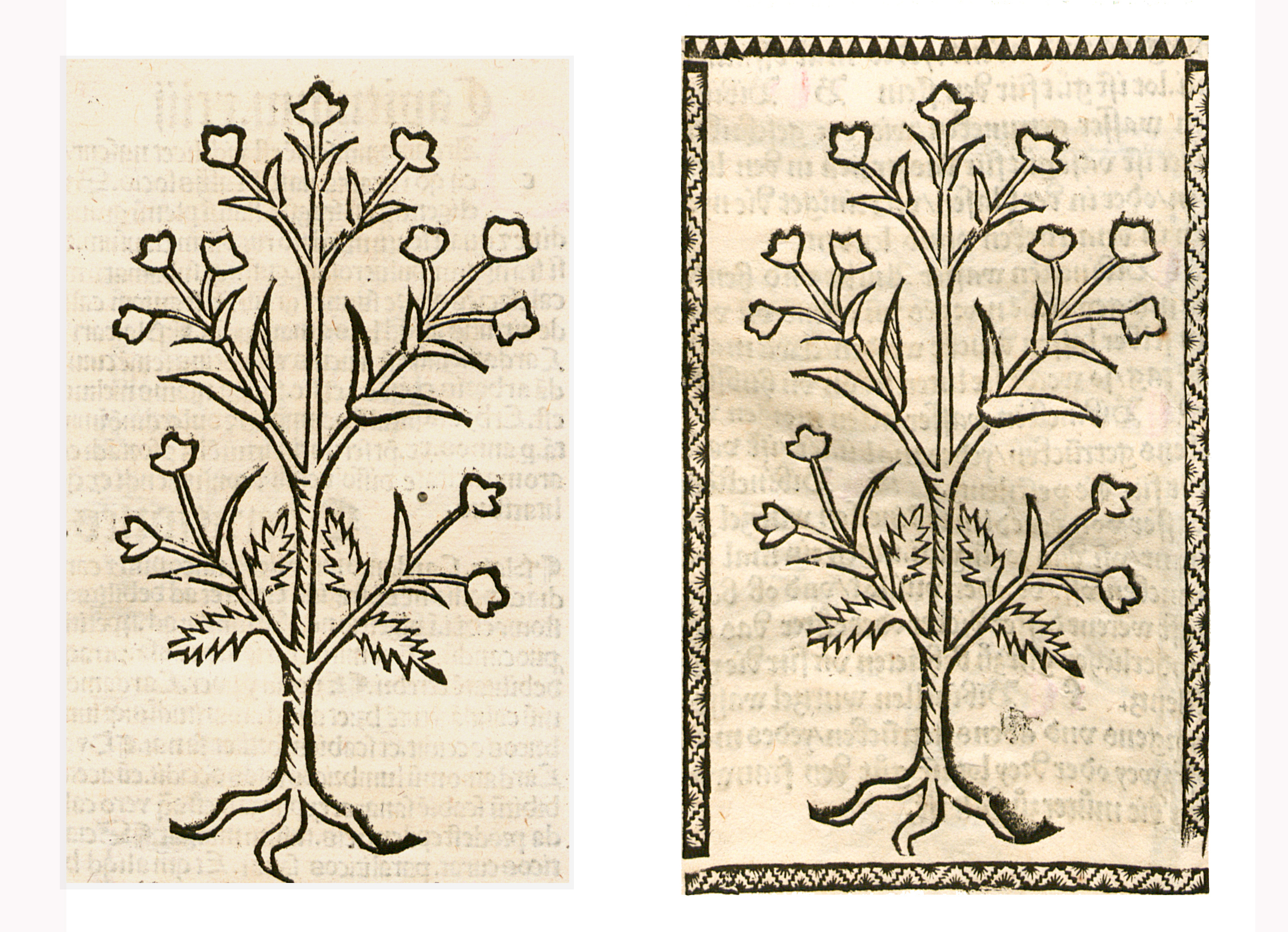 Abbildung von: Portulak